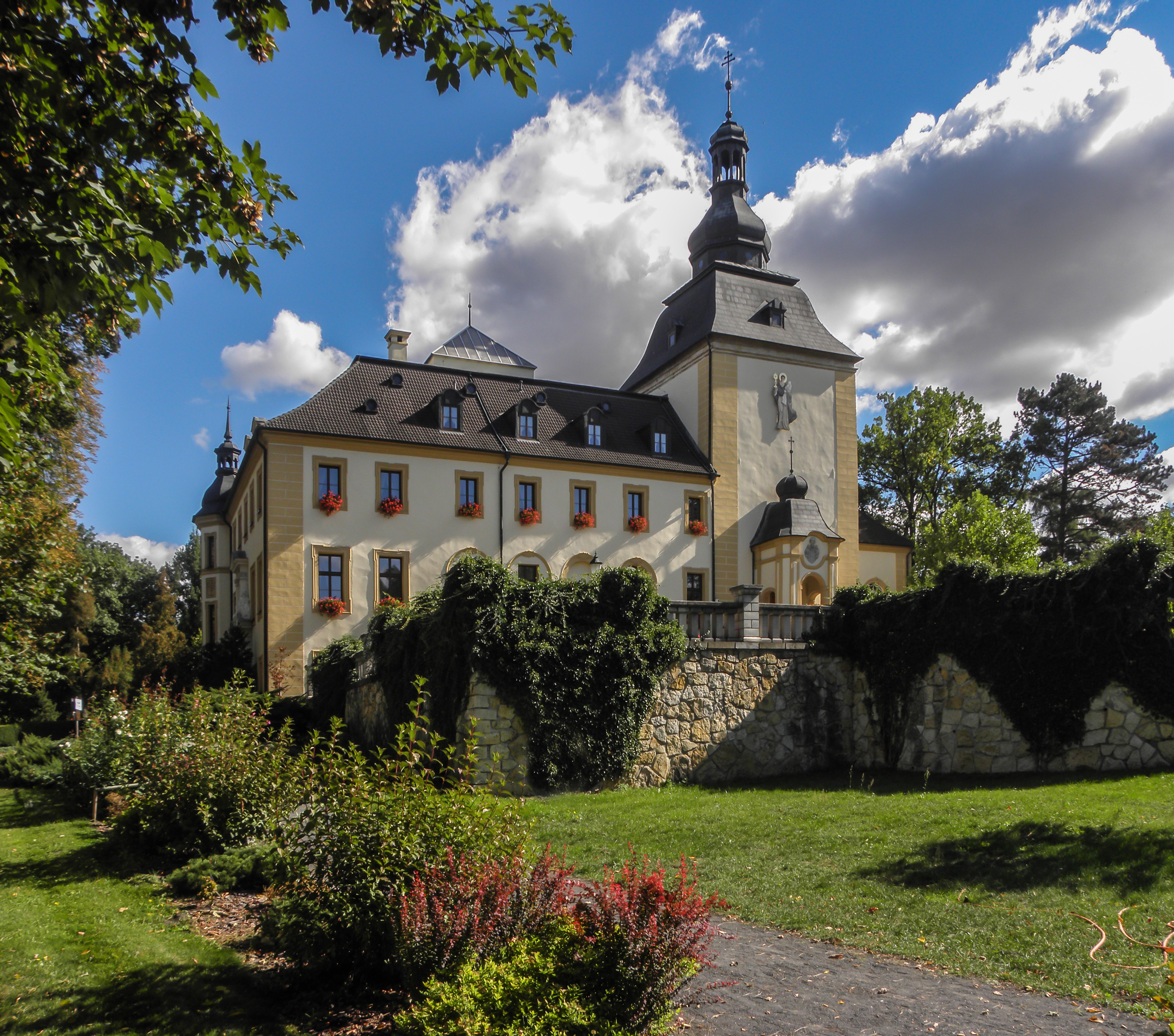 Kamień Śląski, pałac, XVII/XVIII, 2 poł. XIX